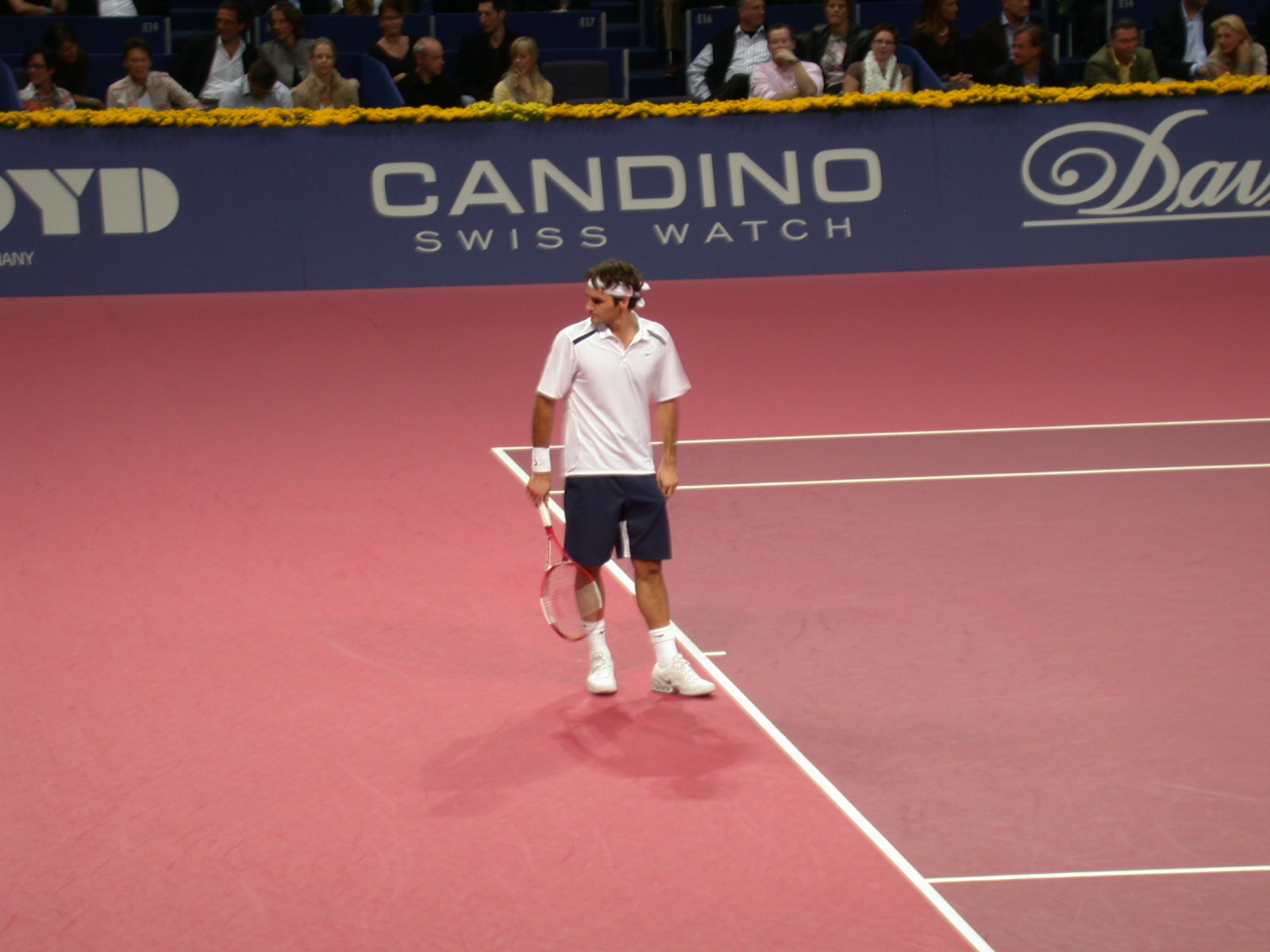 Roger Federer in Basel, Swiss Indoors 2006, semifinal against Paradorn Srichaphan